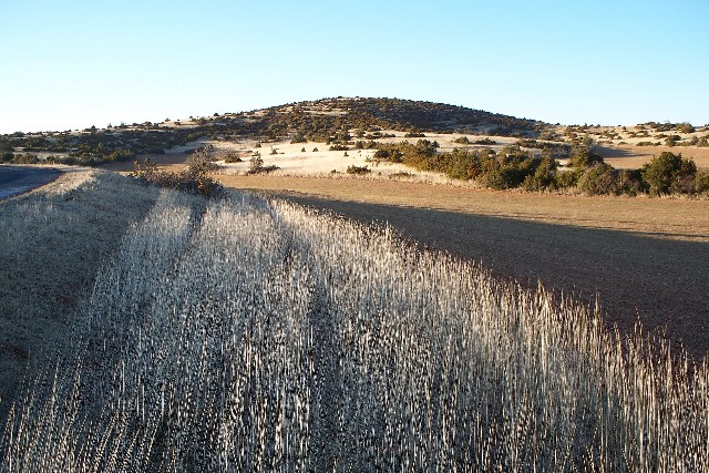 Le puech de Cougouille, point culminant du plateau du Larzac